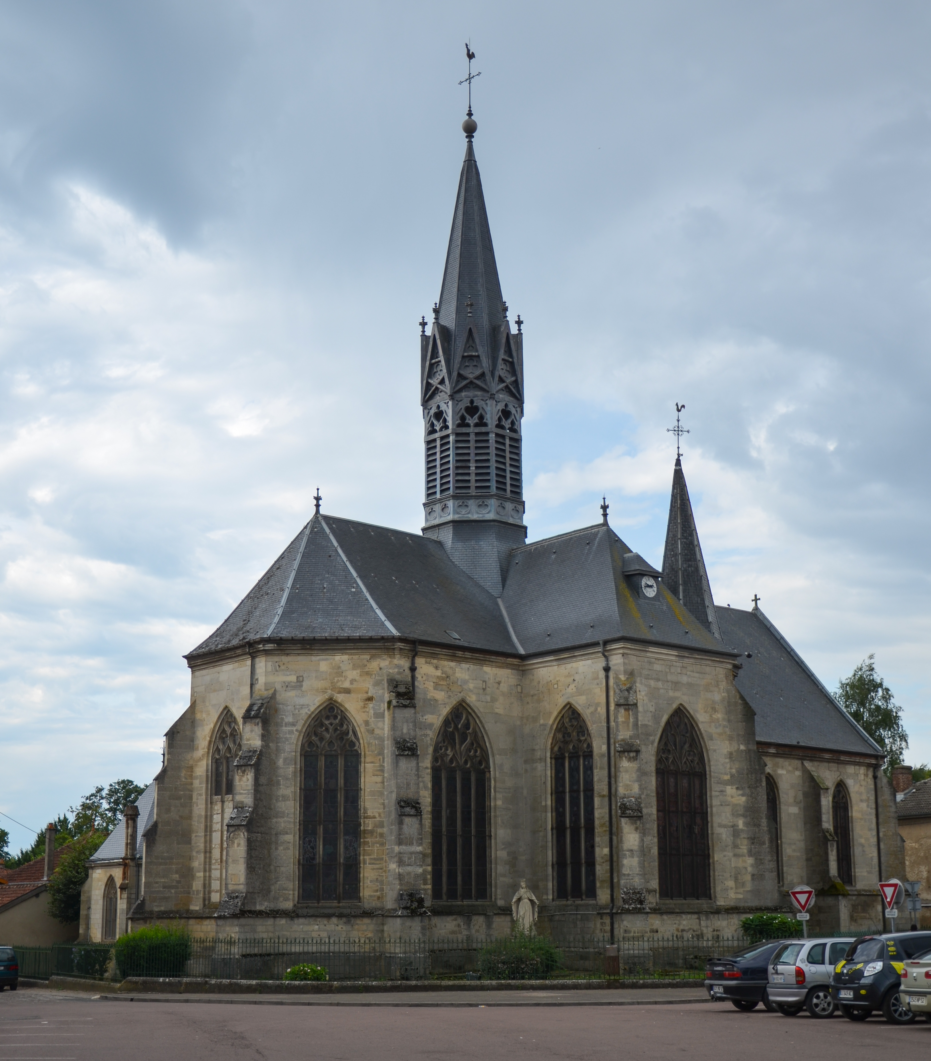 Eglise d'Eclaron, Haute Marne, France